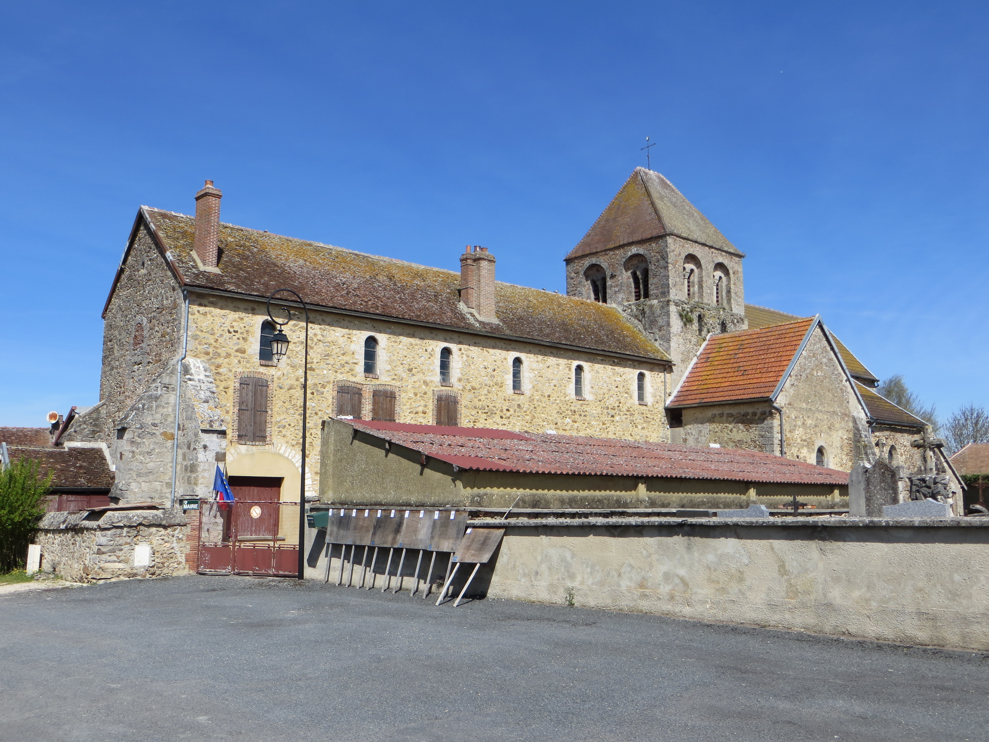 Église Saint-Didier et mairie. Celle-ci occupe l'ancienne nef de l'église.